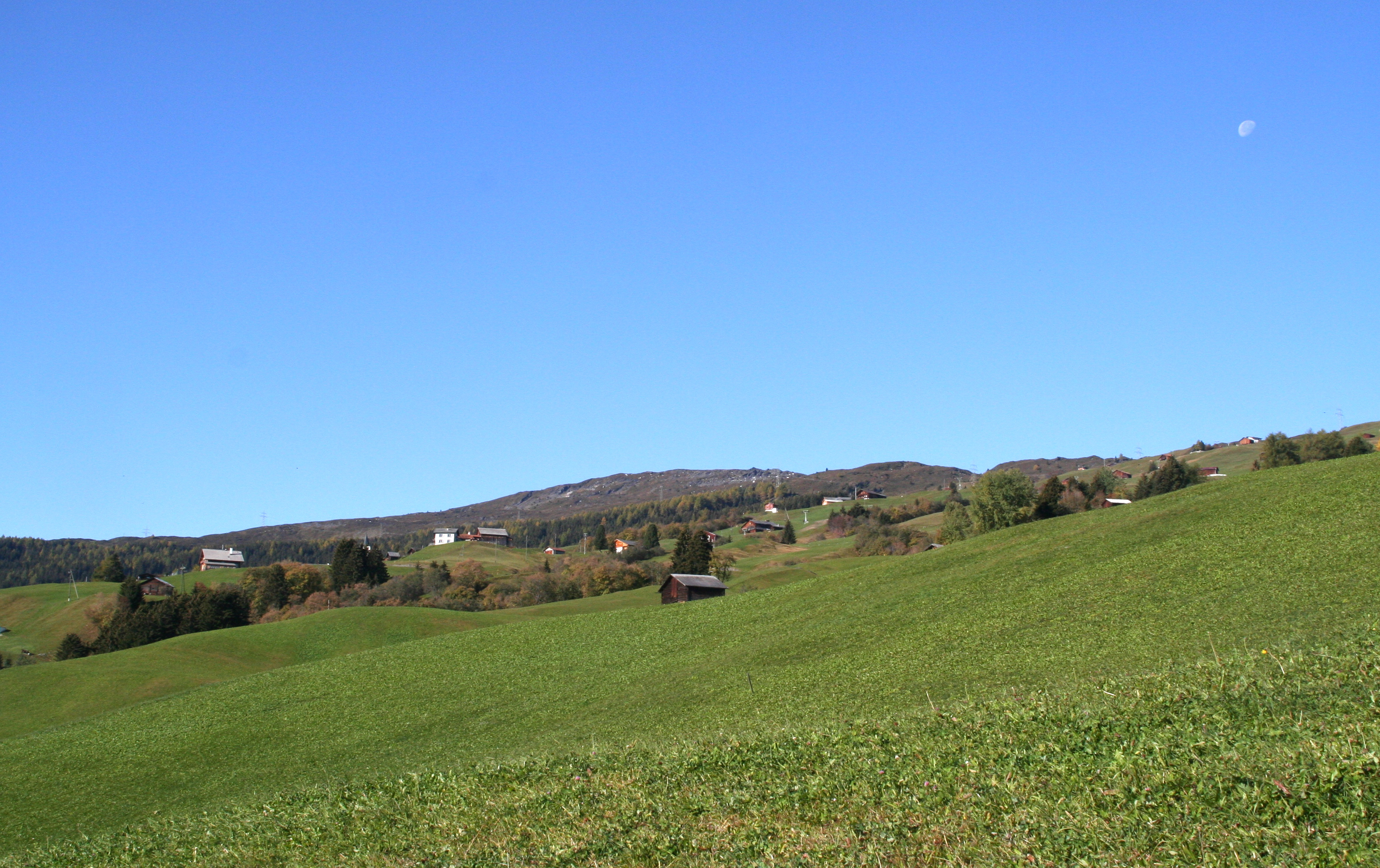 Tschappina Streusiedlungen